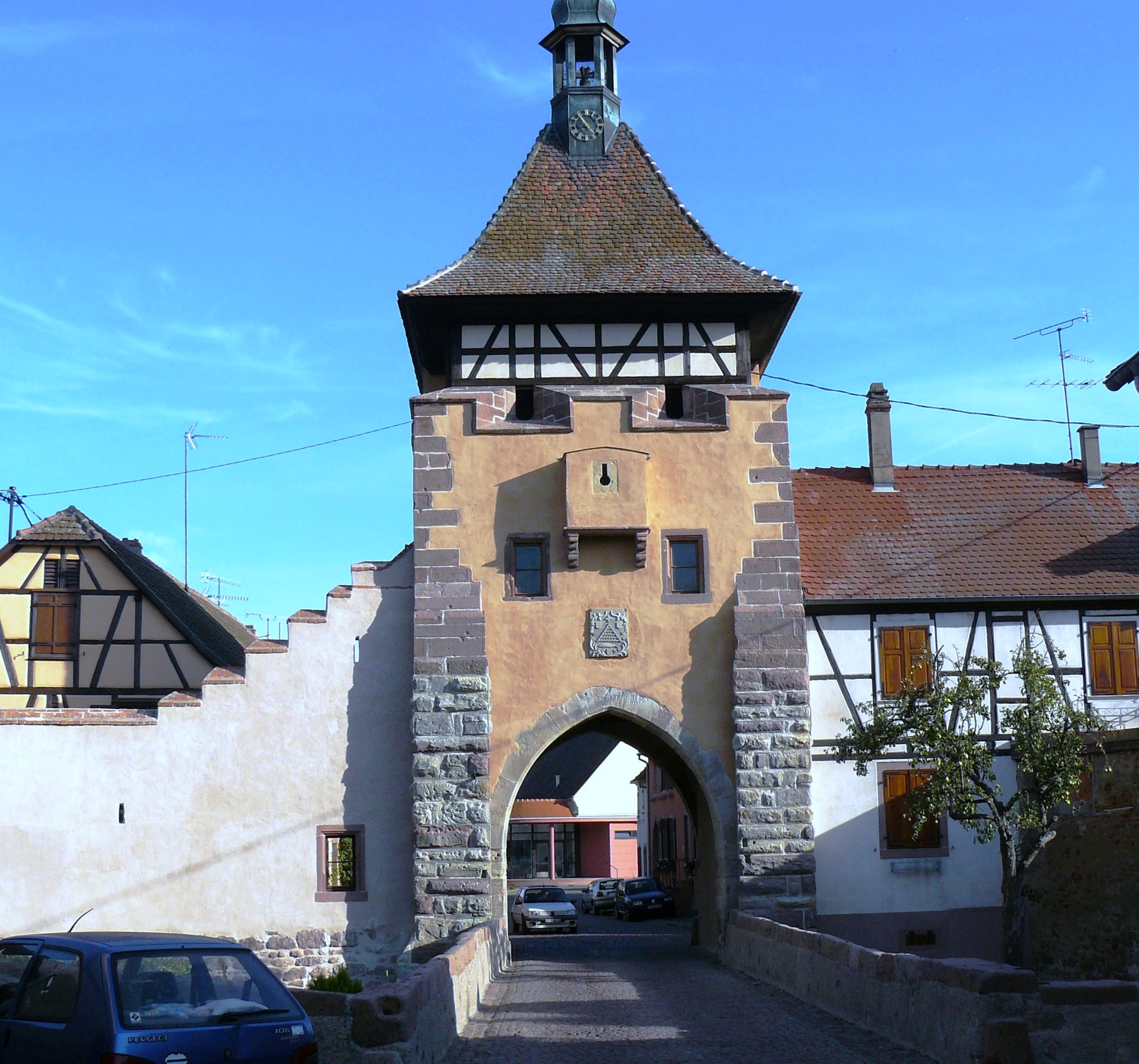 La tour haute (côté nord-ouest) réhabilitée en 2009